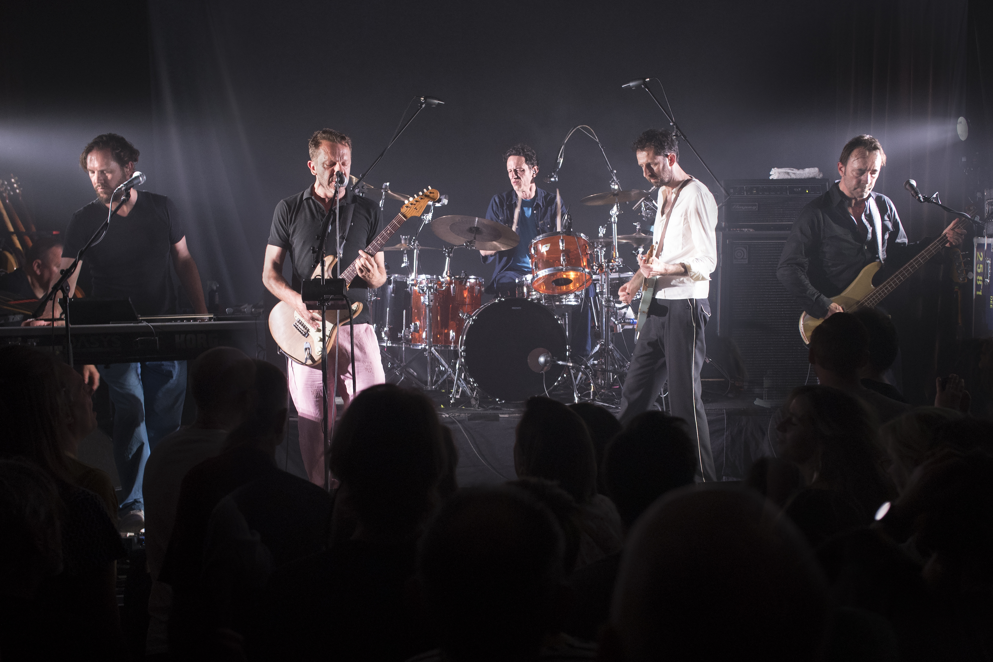 Deus in 2019